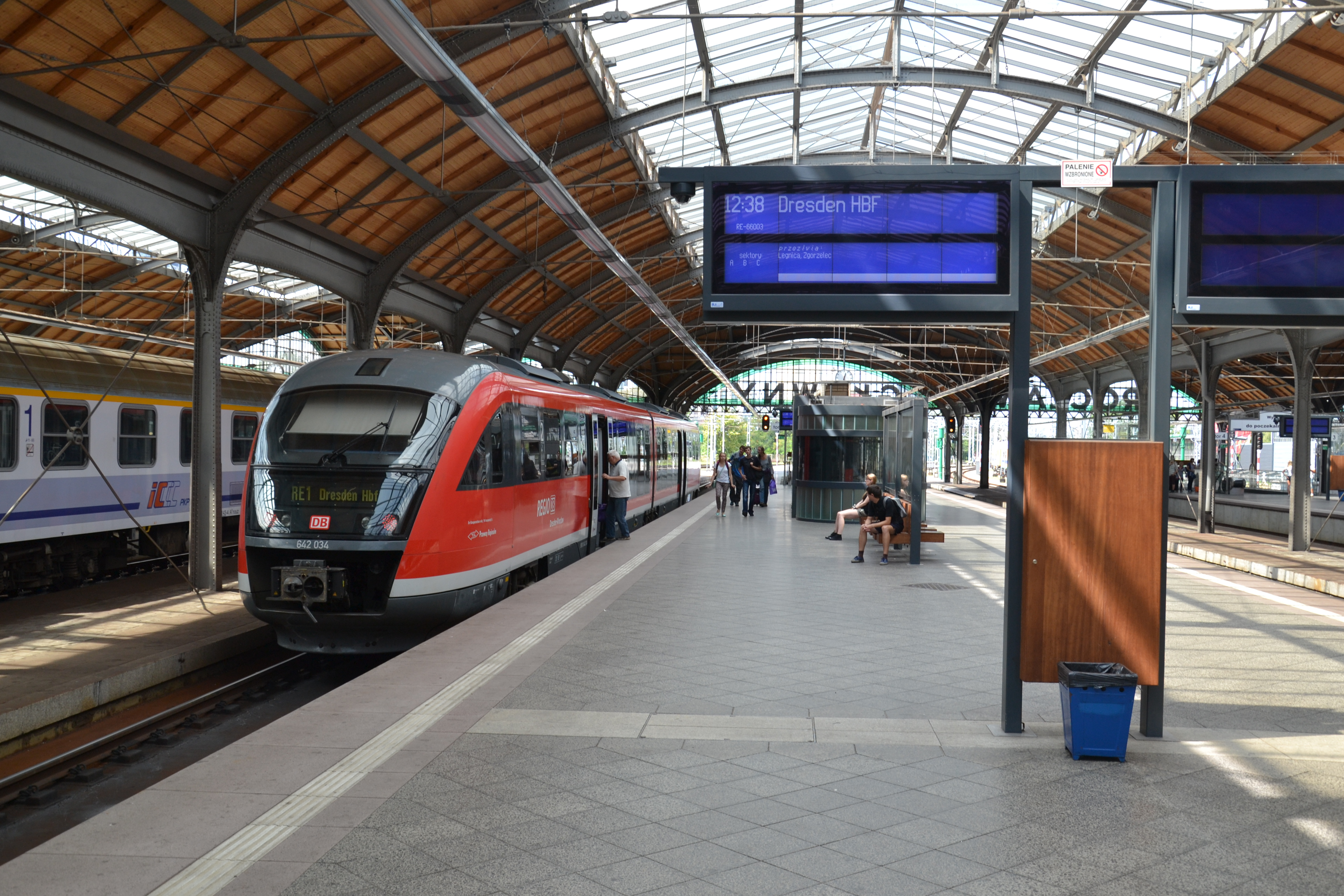 Niemiecki spalinowy zespół trakcyjny VT642 034 jako pociąg Wrocław - Drezno, Wrocław Główny